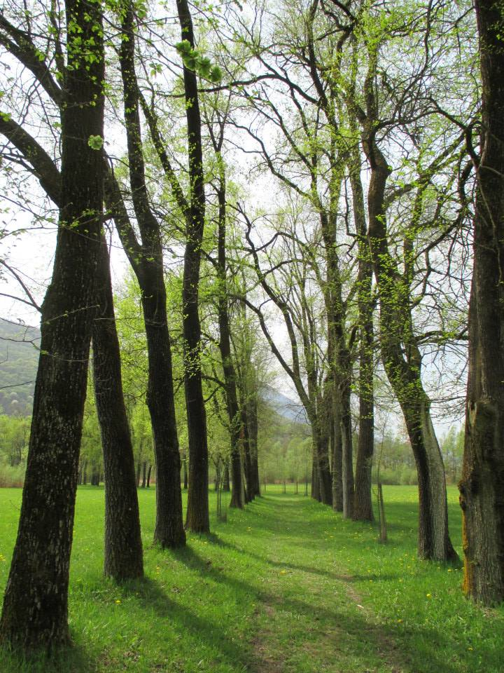 Filare del Prà dei Olmi presso la Riserva naturale Vincheto di Celarda, Feltre - Belluno - Italia